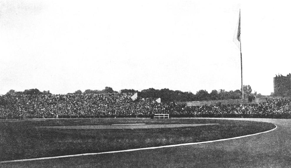 Stade de Colombes, finale des JO de 1924.